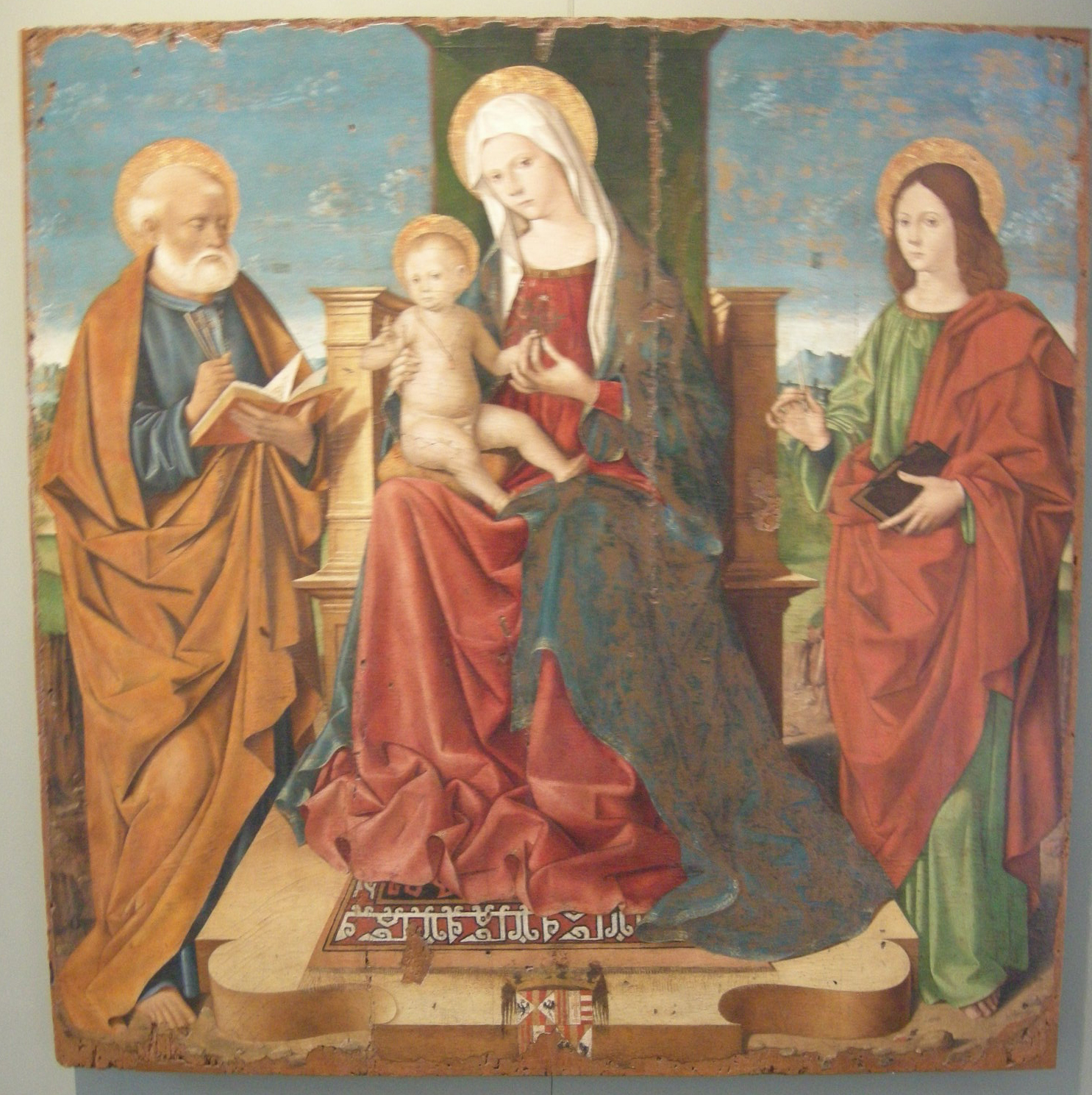 Museo regionale di messina, salvo di antonio, madonna col bambino tra i santi giovanni evangelista e pietro